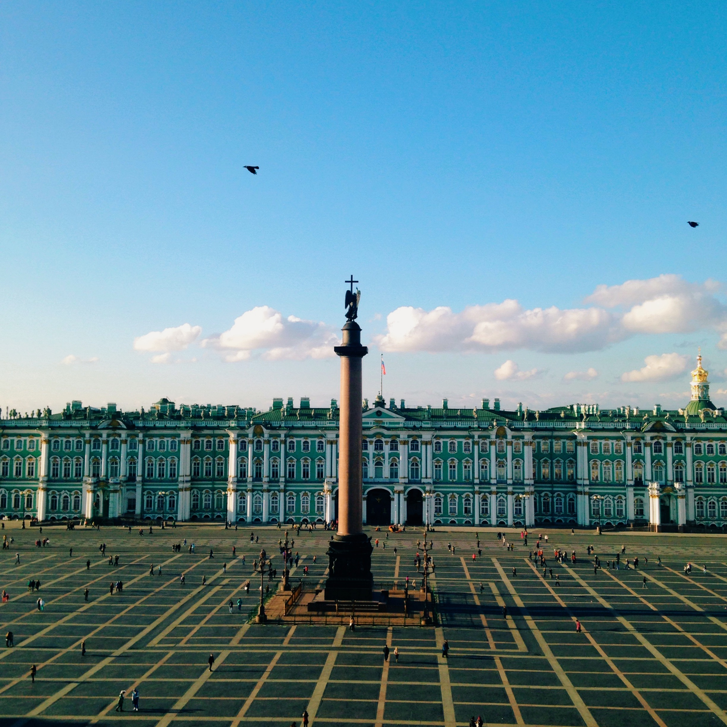 Ансамбль Дворцовой площади: Дворцовая площадь, Центральный район, Санкт-Петербург